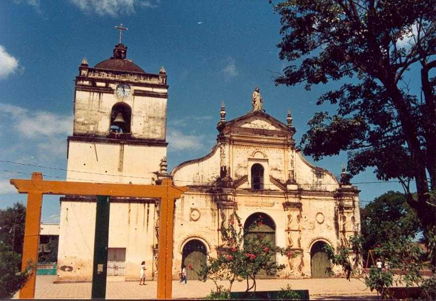 Parroquia de La Asunción en Masaya Nicaragua América Central. (1988) En el año 2001 ocurriò un terremoto en la ciudad que obligò a renovar la parroquia, la imagen que se ve en el capitel, se cayò, actualmente en el nicho que se ve al centro, se ubicò un vitral que muestra a La Asunciòn, en sustitución a la imagen caida. Hoy dìa la iglesia y todo el parque a su alrededor fue reformado. vea [1]